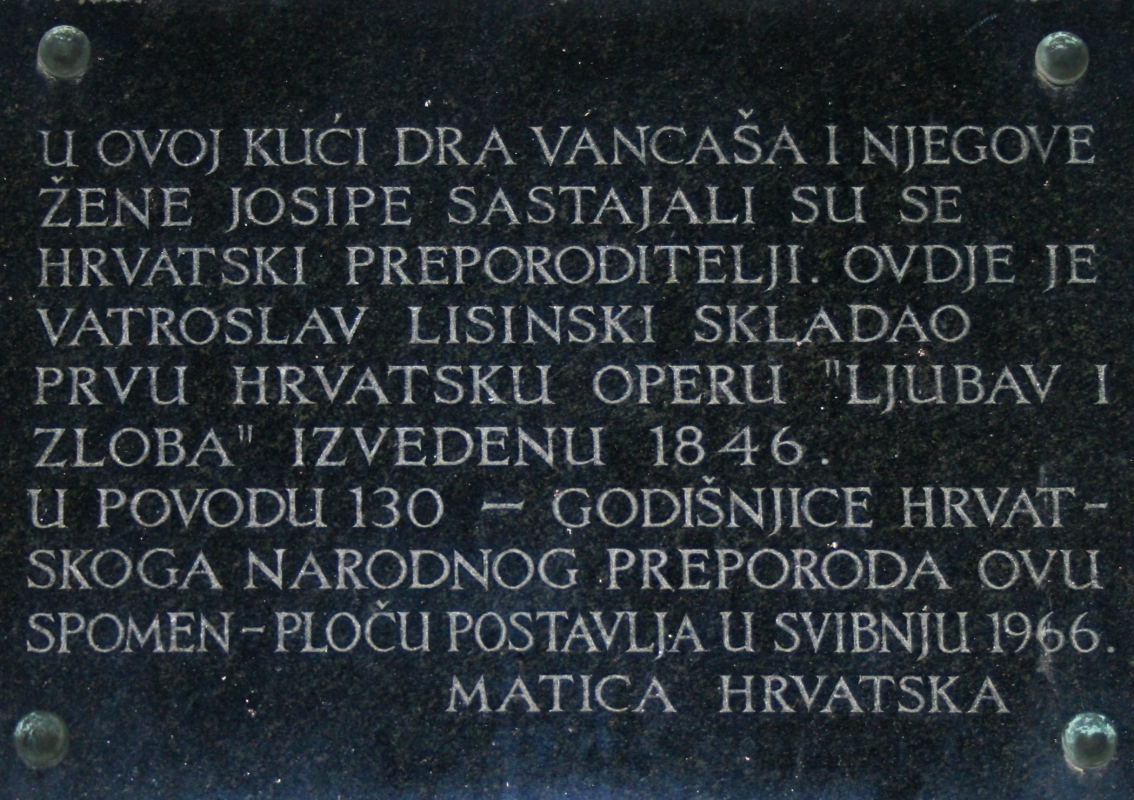 Spomen ploča na kući u kojoj su se sastajali hrvatski preporoditelji i u kojoj je Vatroslav Lisinski skladao prvu hrvatsku operu "Ljubav i zloba" u Zagrebu, Hrvatska